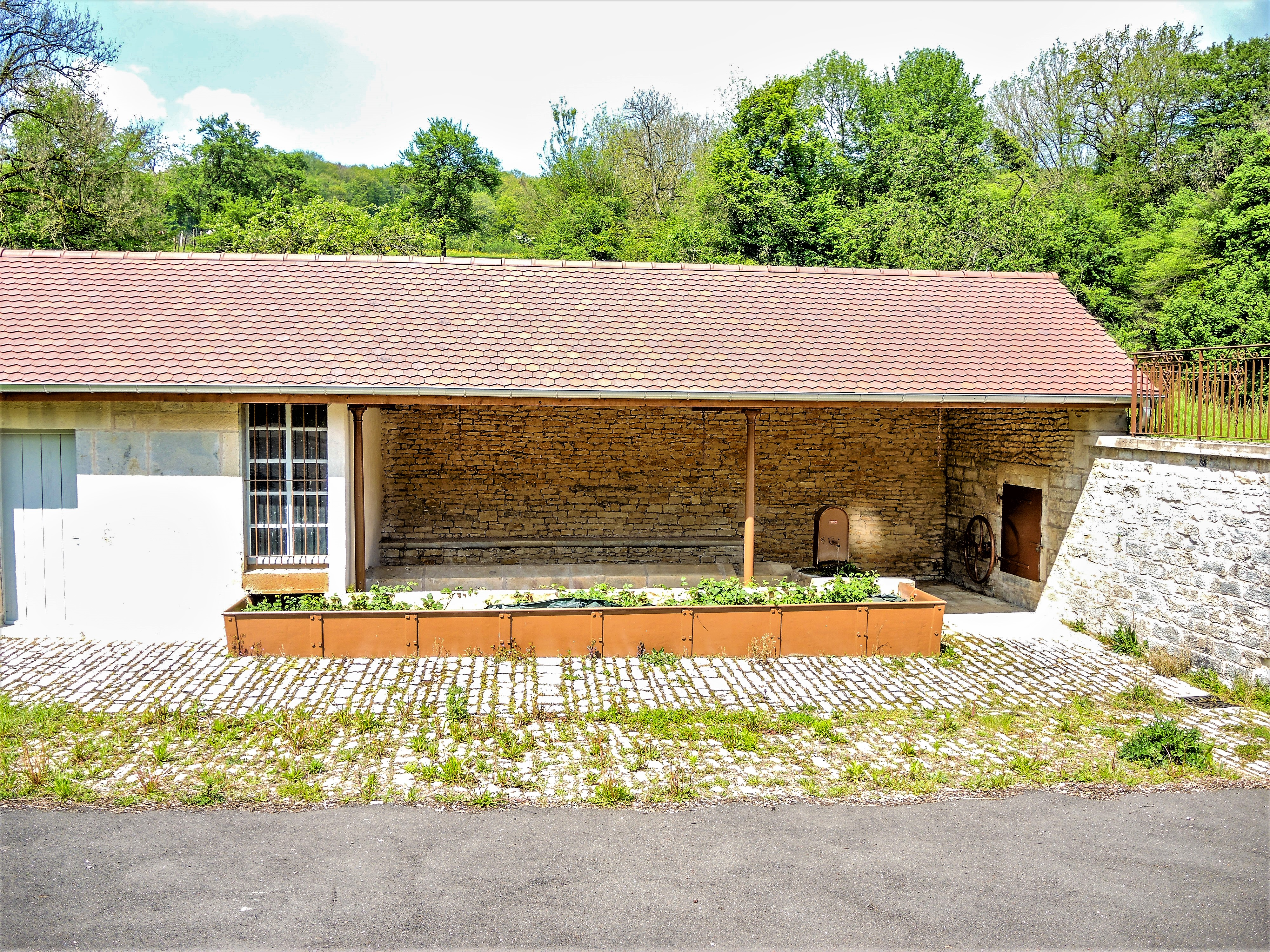 Fontaine-lavoir couverte